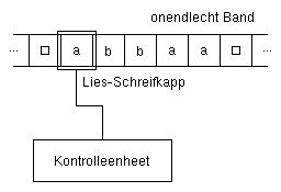 Turingmaschinn (Juli 2005).